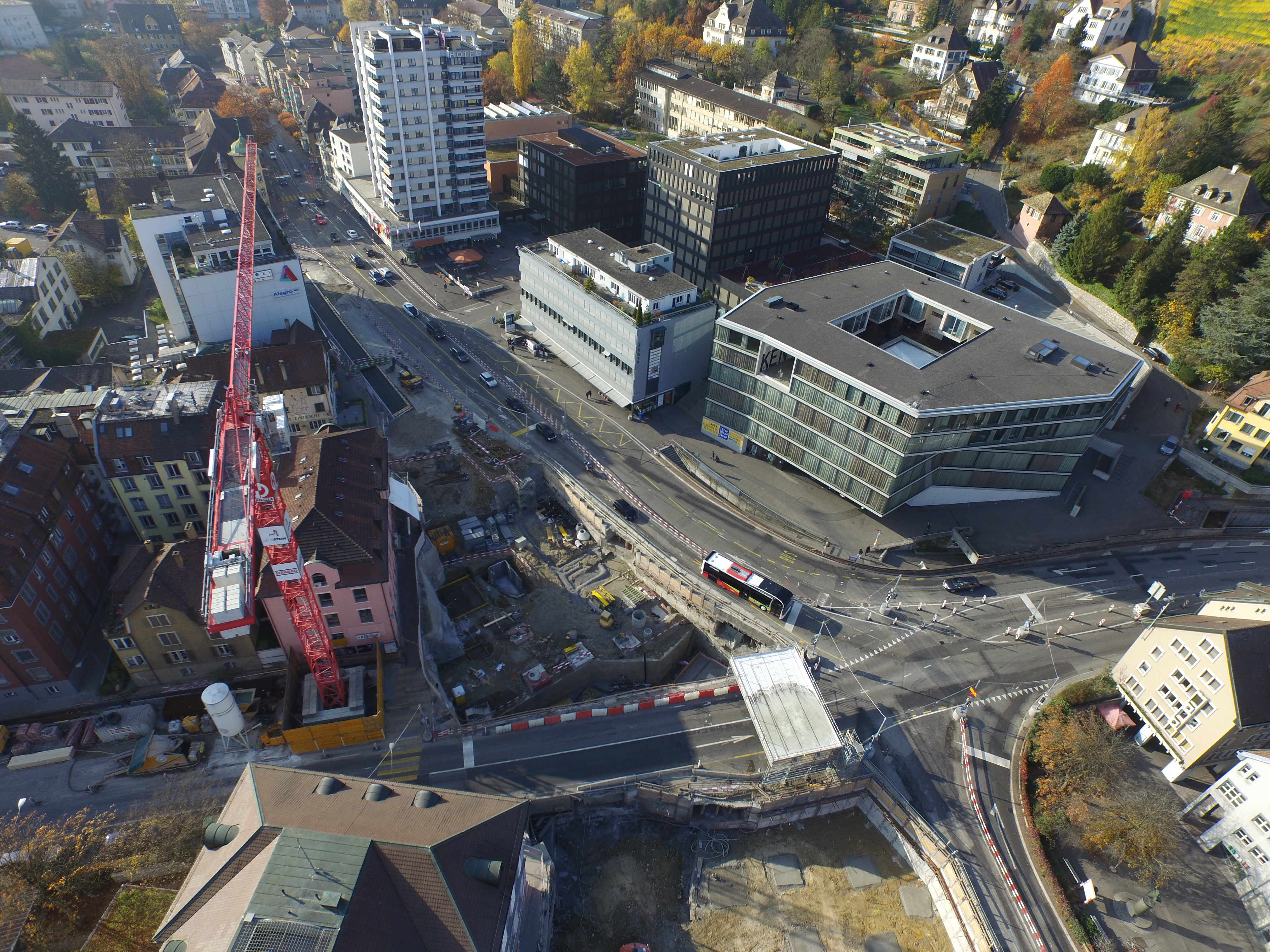 Baden AG